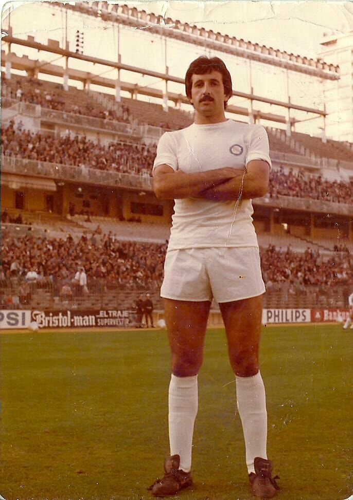 futbolista navarro